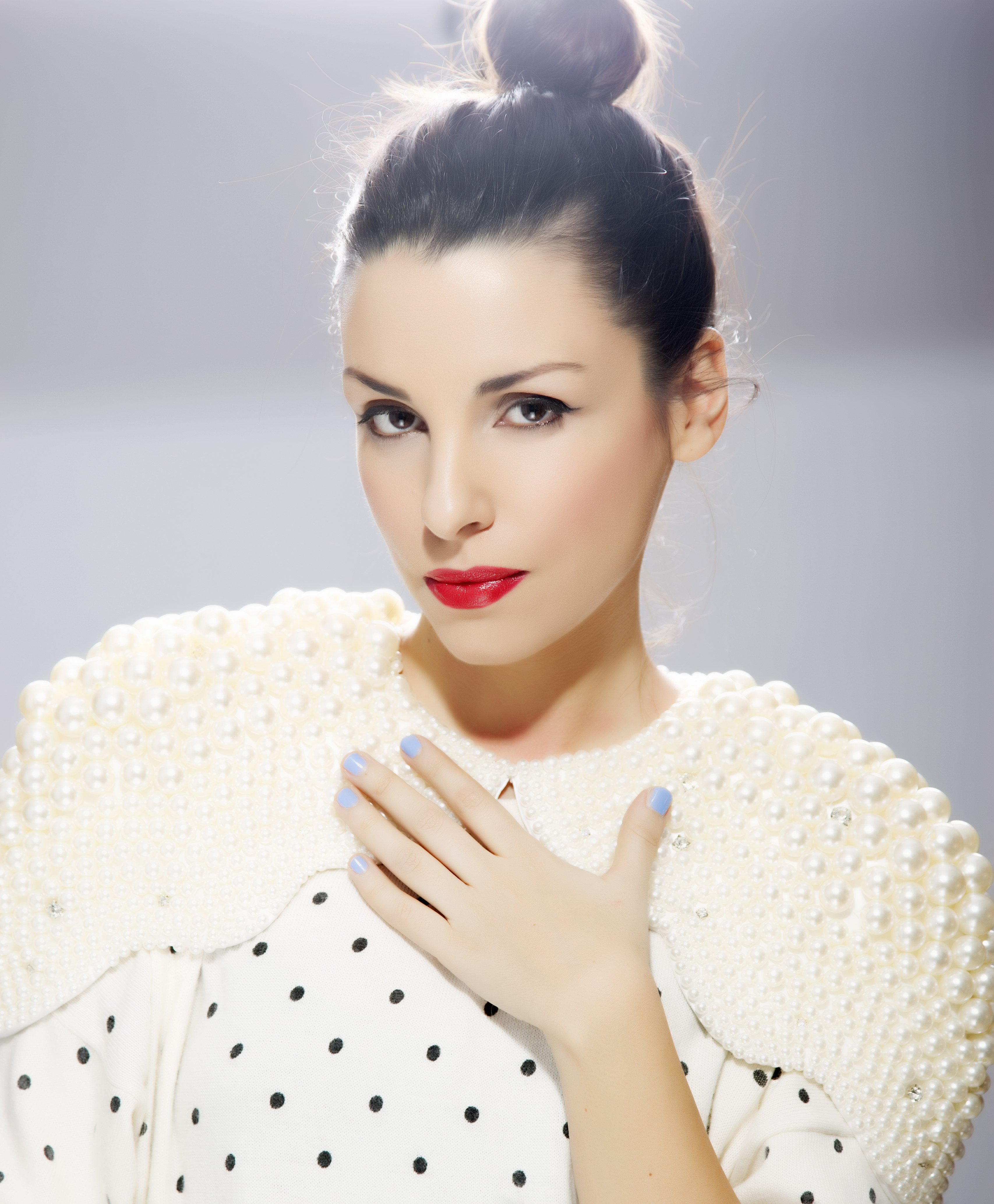 Ana Ljubinković, umetnica i modna dizajnerka